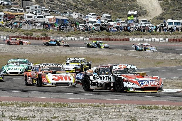 tc en trelew